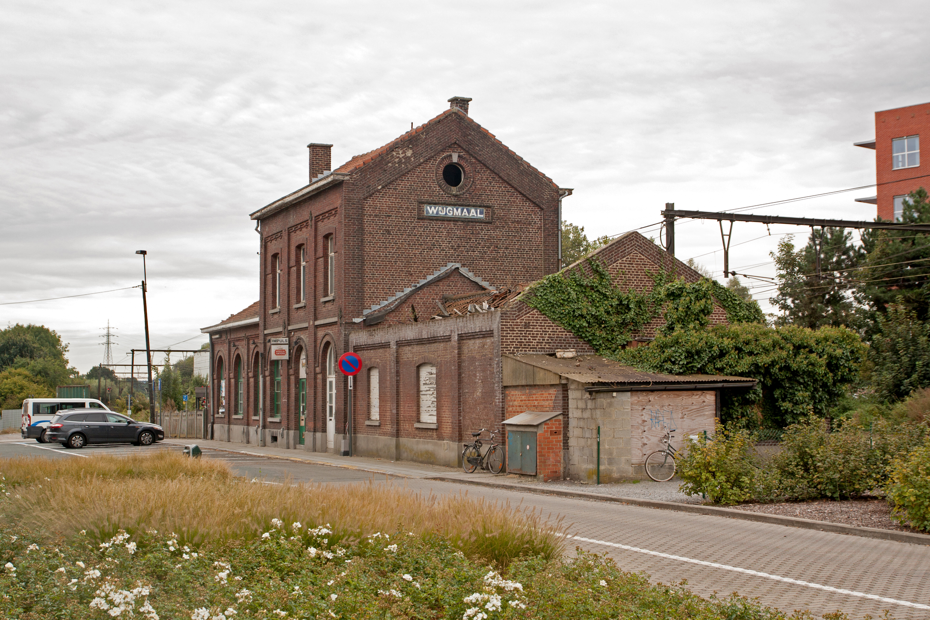 Het vervallen stationsgebouw van Wijgmaal met ingestort dak. Gefotografeerd in 2012.